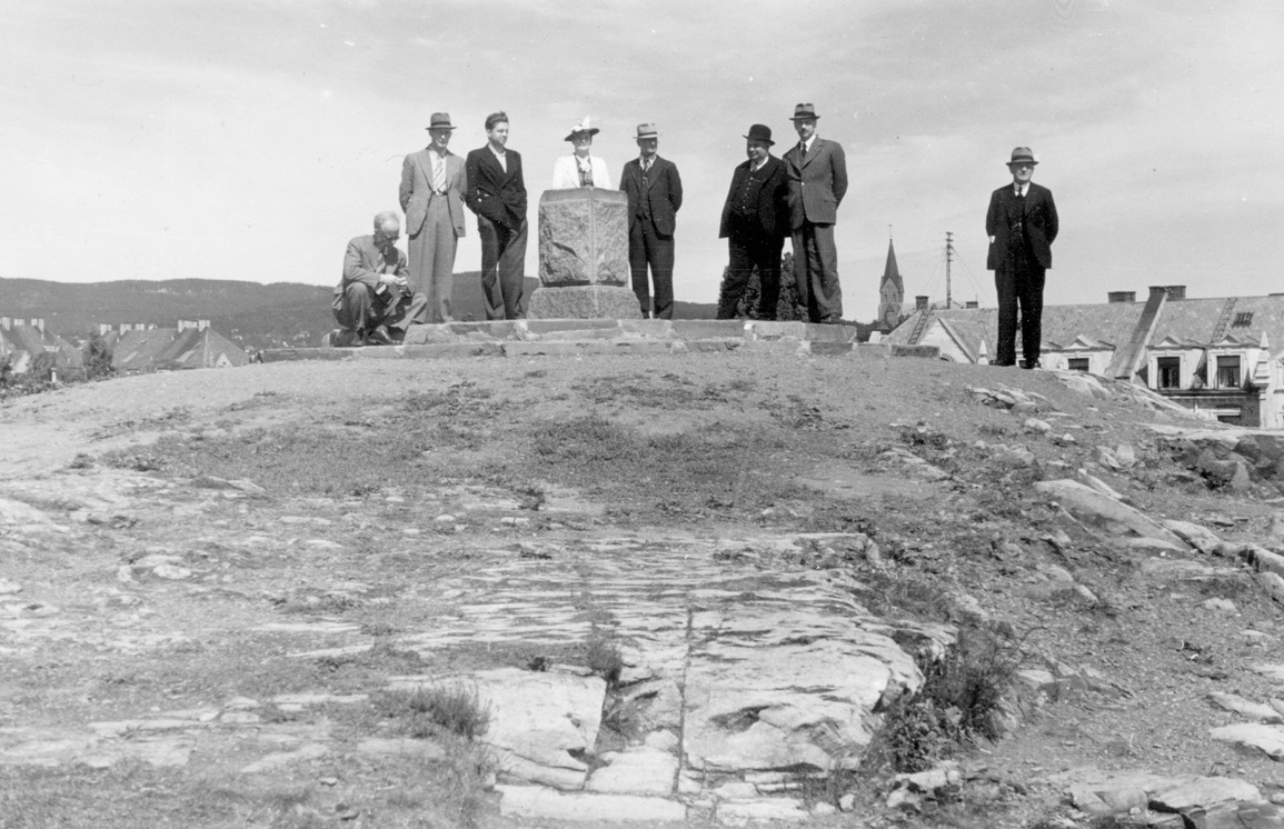 Parkutvalget på befaring i parken ved varden / utsiktspunktet øverst på Blåsen.